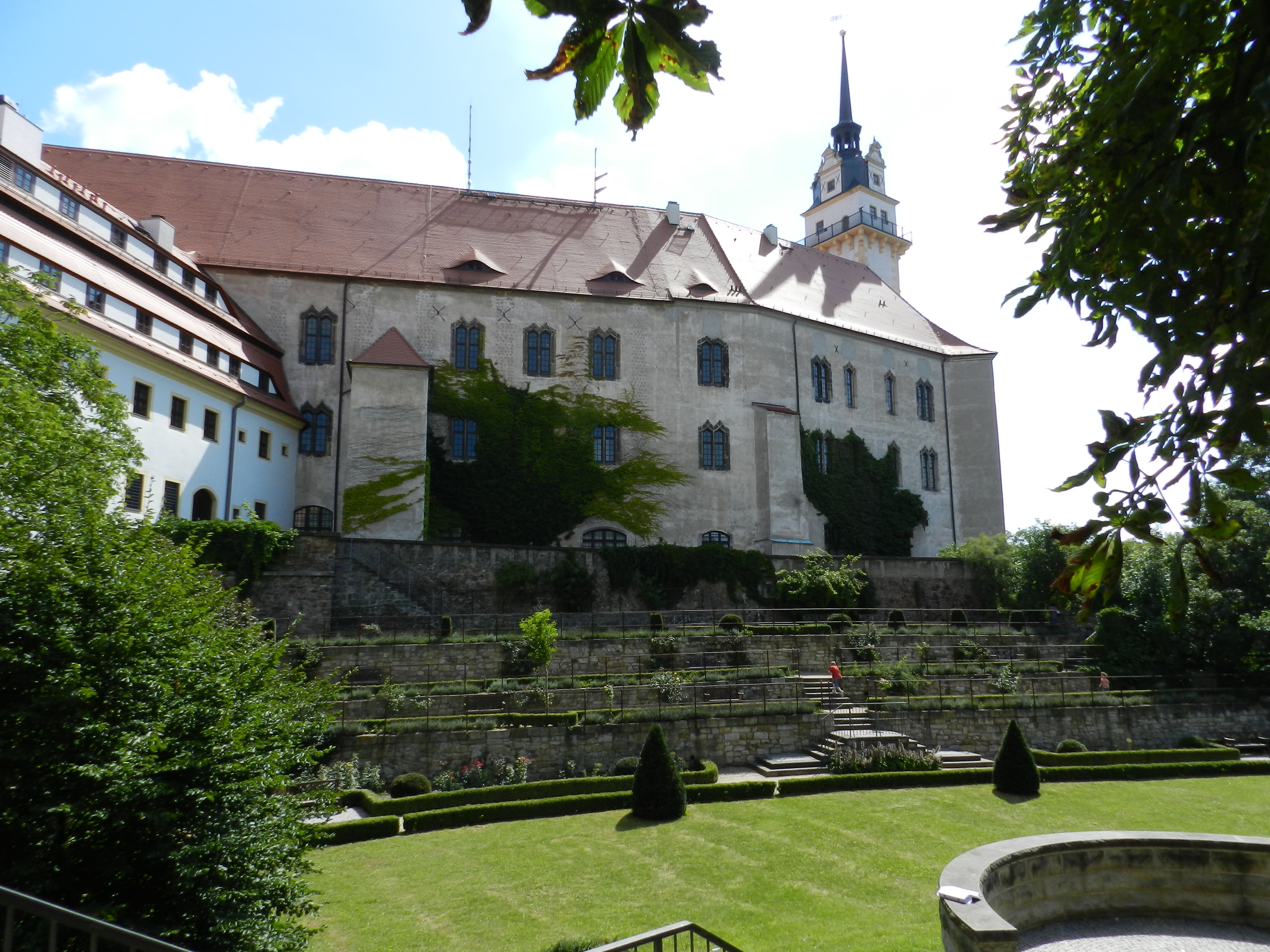 Torgau, Schloss Hartenfels, "Rosengarten" (23. Juli 2011)